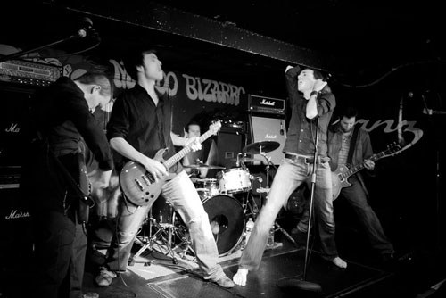 Photo personnelle du groupe Devianz